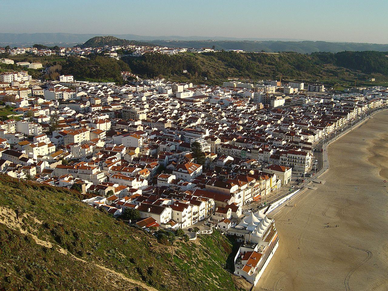 Nazaré - Portugal